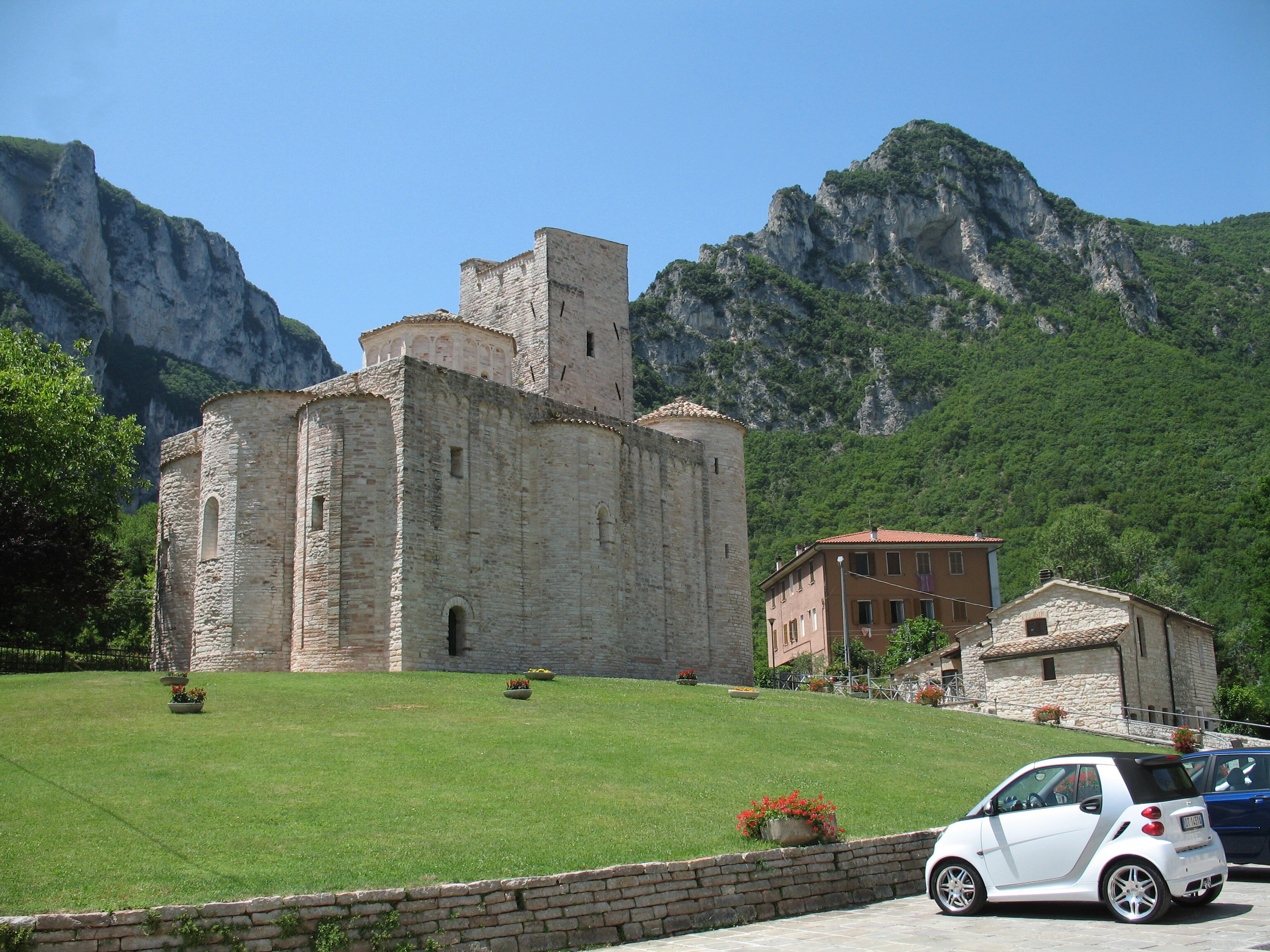 Opatství San Vittore na území obce Genga (provincie Ancona)